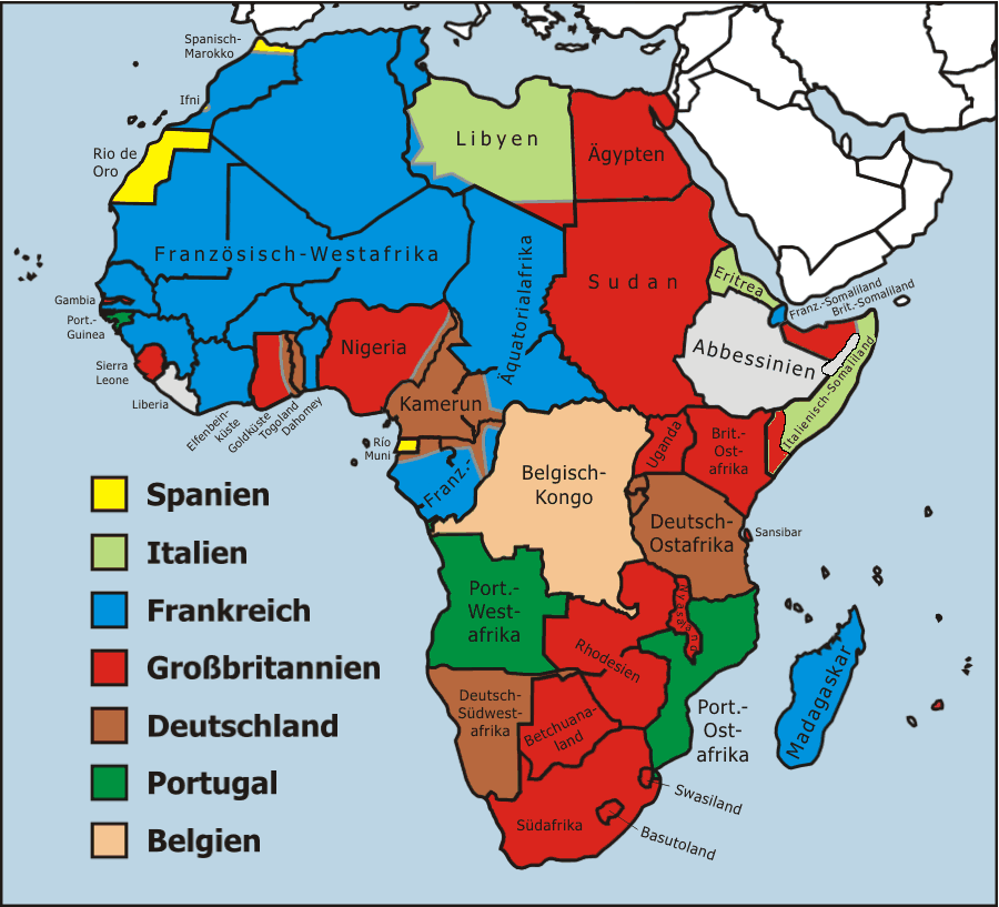 Kolonisation Afrikas, im Jahre 1914